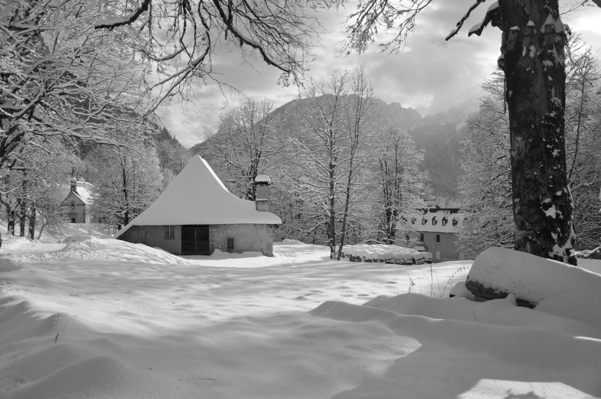 annexe à la Grande Chartreuse .